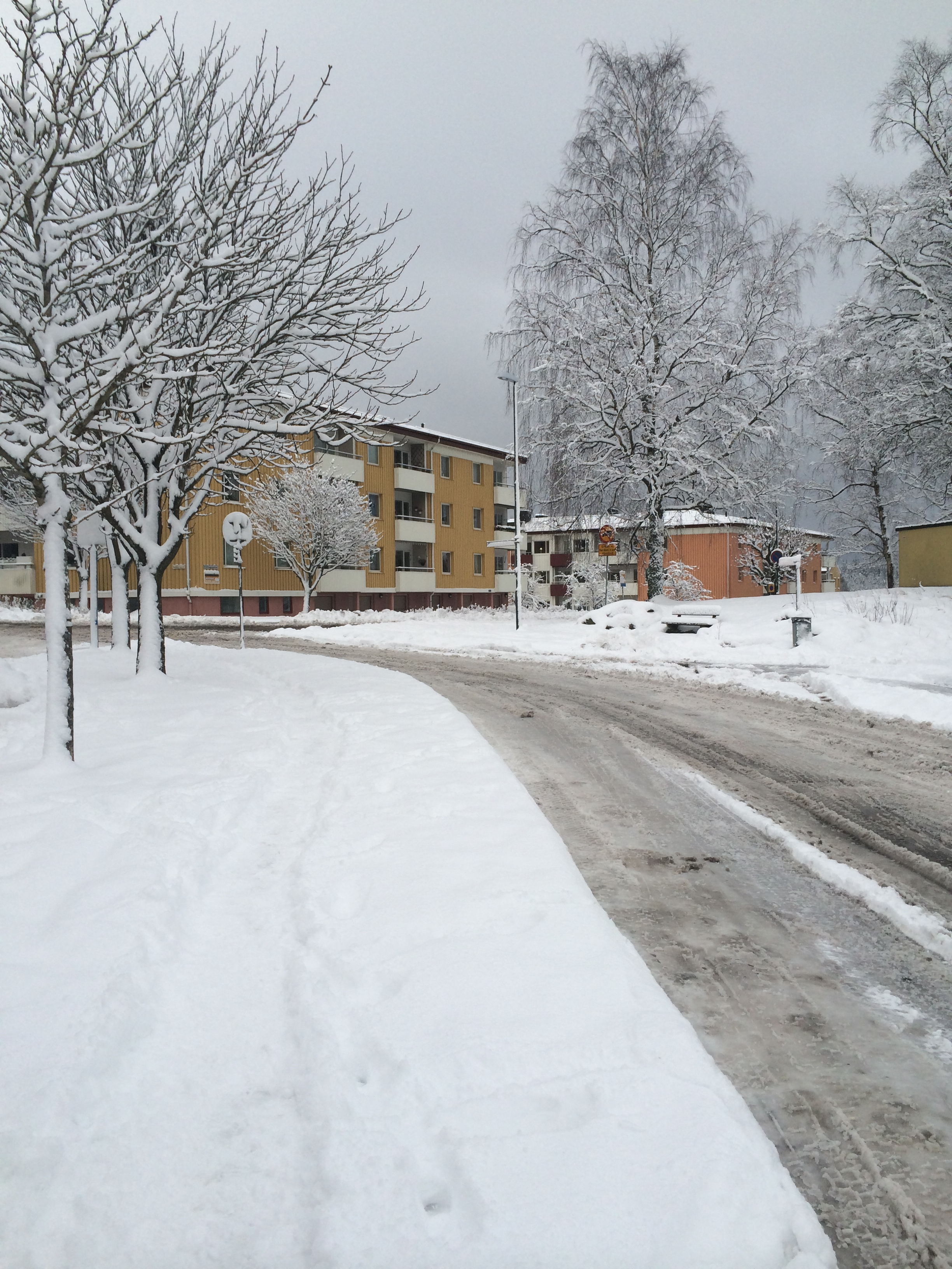 Östergårdsplan, Trandared, Borås, i vinterskrud januari 2015.